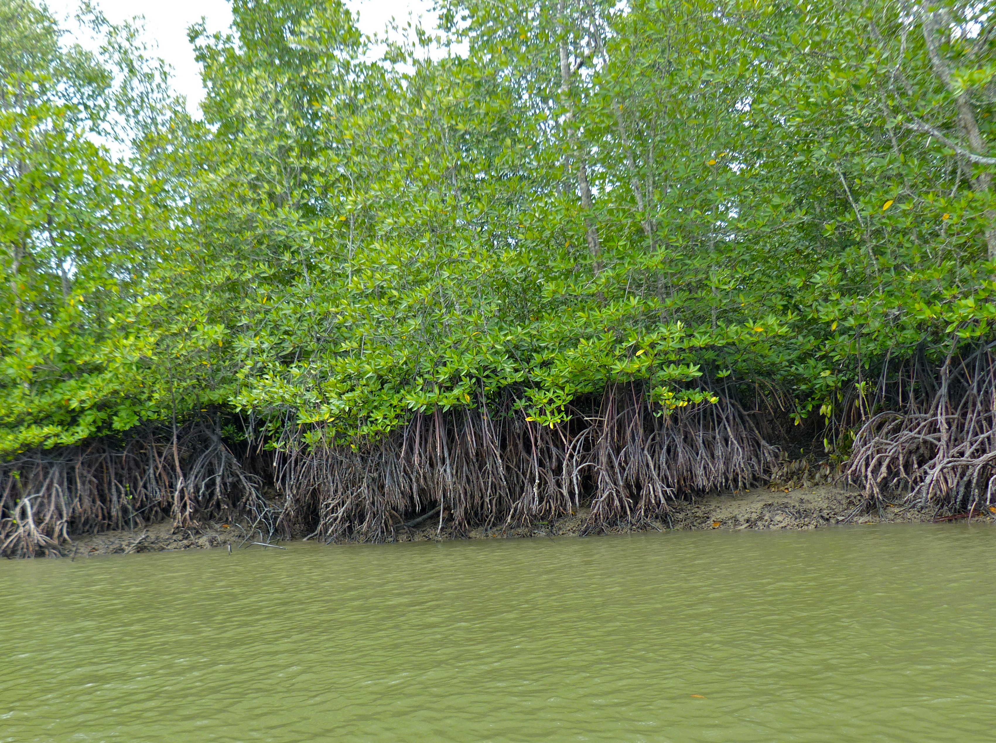 Batang Salak Estuary North of Kuching, Sarawak, MALAYSIA